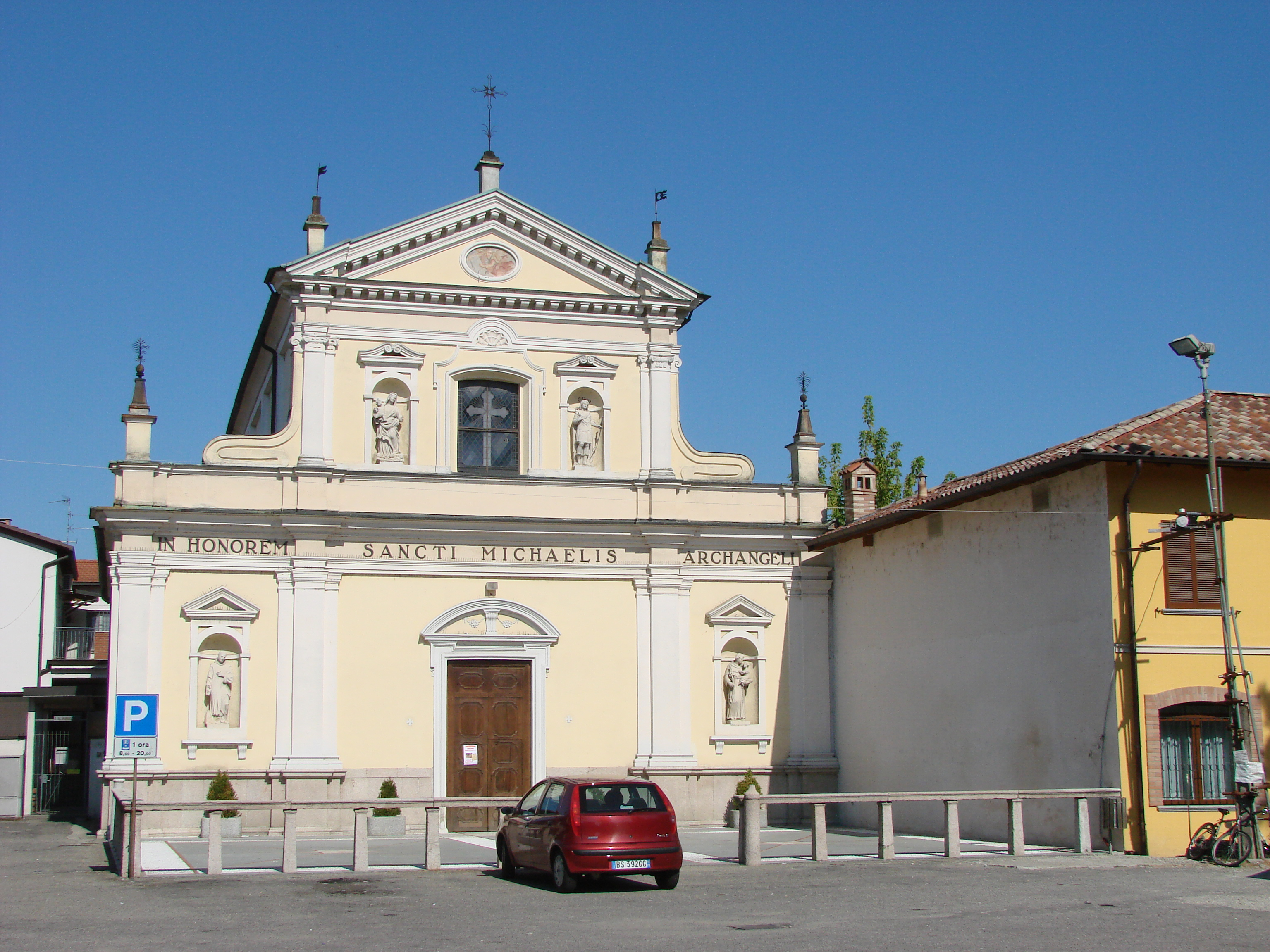 Chiesa parrocchiale San Michele Arcangelo, Frazione Torre del Mangano